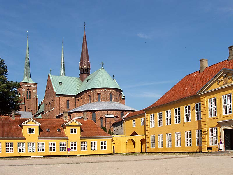 Roskilde Domkirke - set fra bispegården. Bispegården er tegnet og oppført av Laurids de Thurah